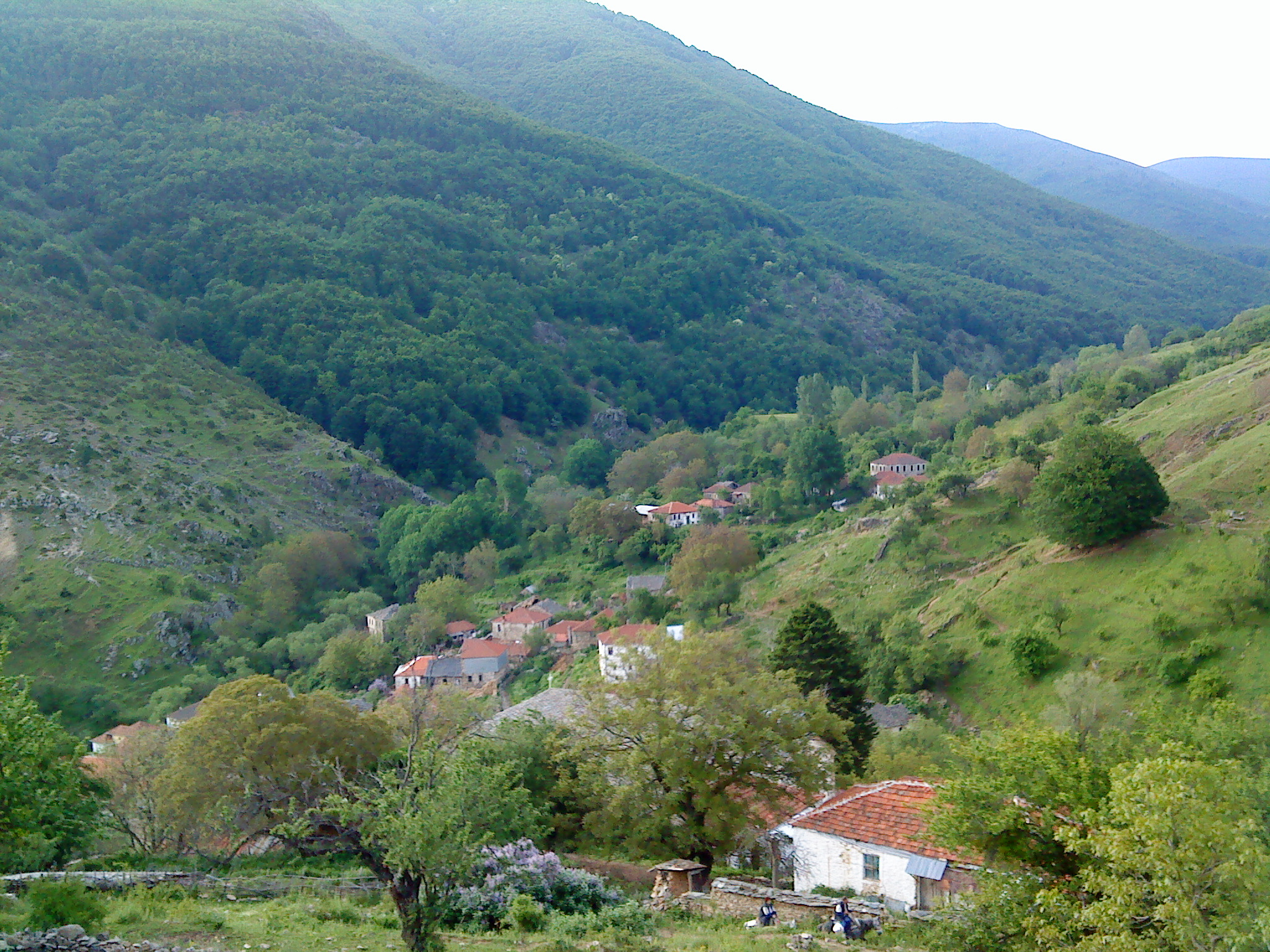 панорама на село маловиште